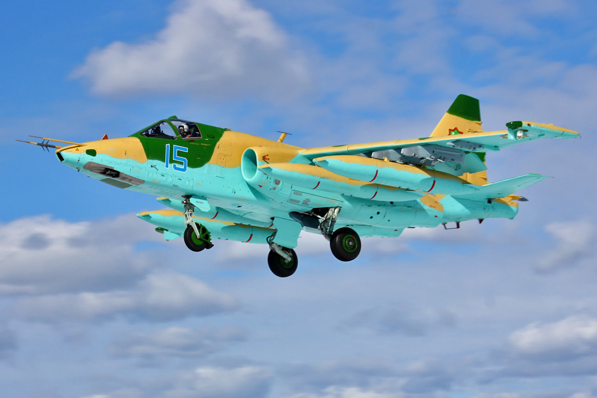 Su-25 Turmenistan AF